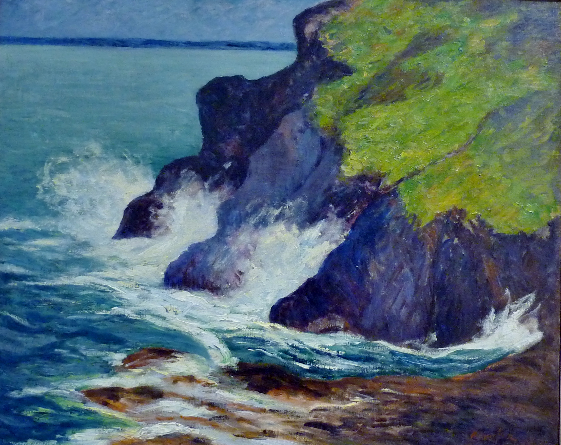 Maxime Maufra : Les trois falaises. Saint-Jean-du-Doigt" (il s'agit en fait de la pointe de Beg-an-Fry, plus précisément des rochers de la pointe Runglaz, situés en Guimaëc) ; au fond, à l'horizon, la côte de Trédrez (Côtes-d'Armor)